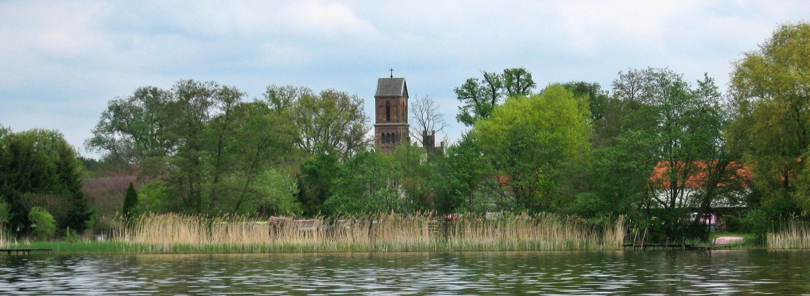 Blick vom Krüpelsee auf Kablow